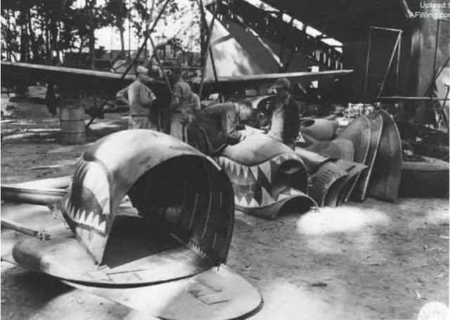 雷允厂为飞虎队组装和修理P-40战斗机场景